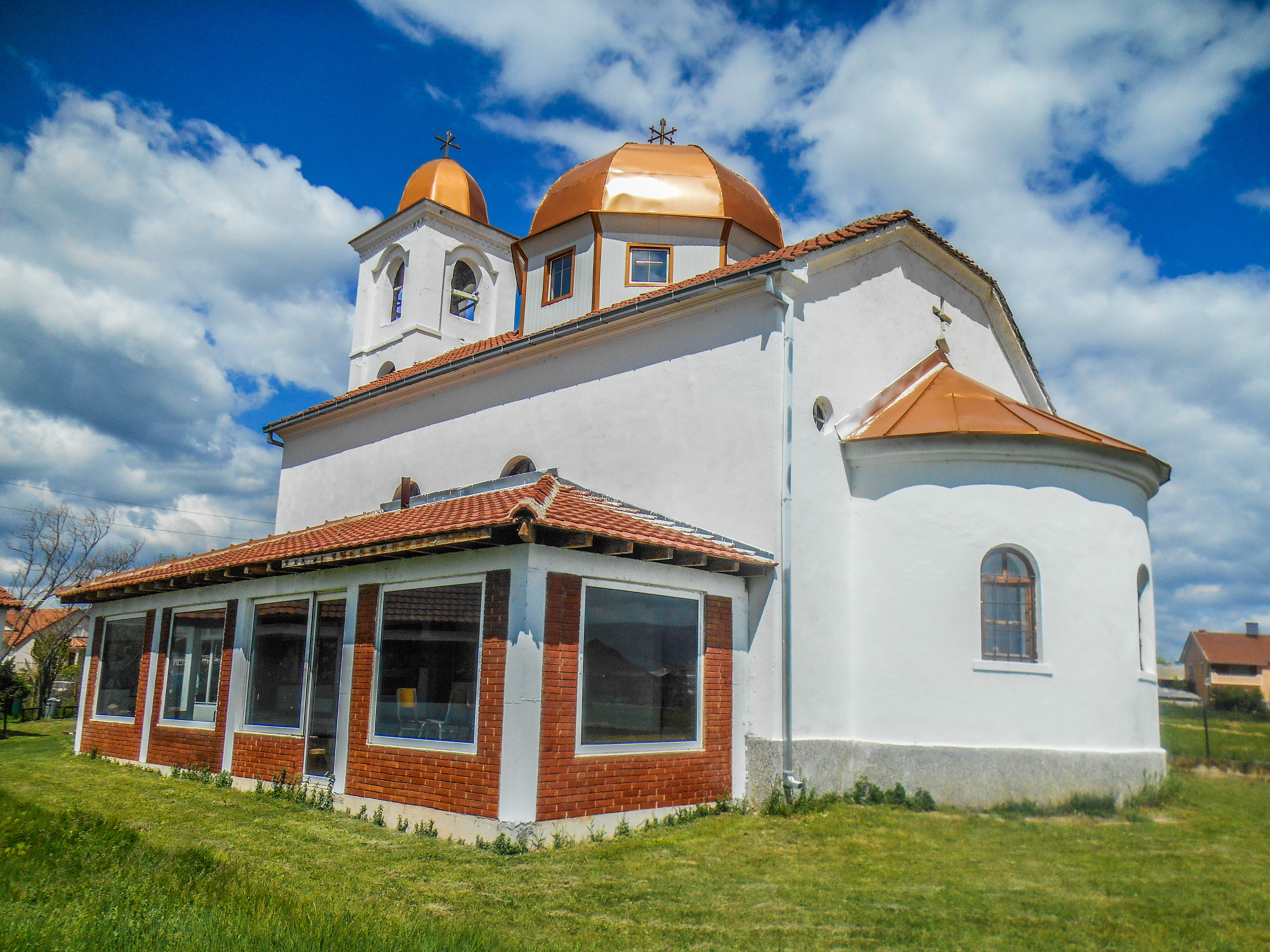 Црква „Св. Никола“ - Градошорци